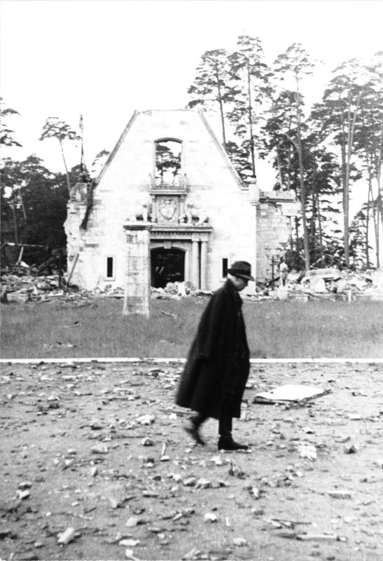 ADN-ZB/Donath "Karinhall" [Carinhall] im Bez. Frankfurt/Oder zerstört; ehemals Sommersitz des führenden Hitlerfaschisten H. Göring. Aufn. v. 1947